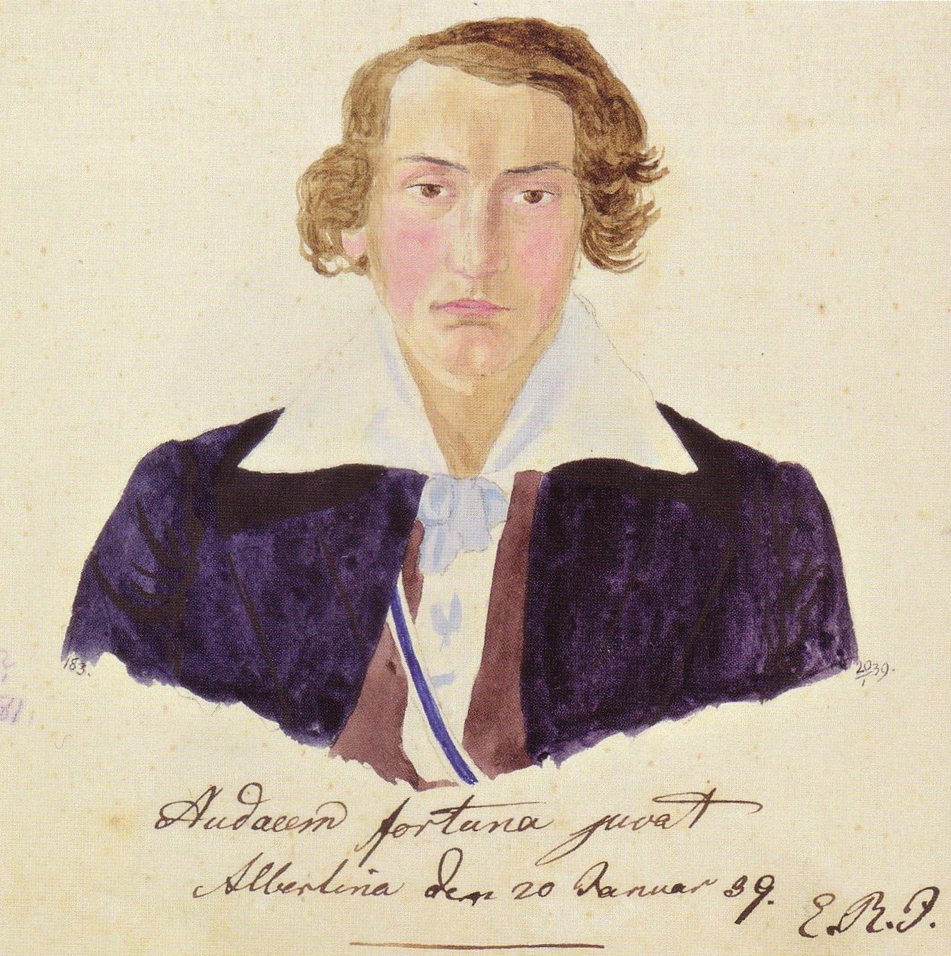 Porträtaquarell von Robert Jaensch (1817-1892)